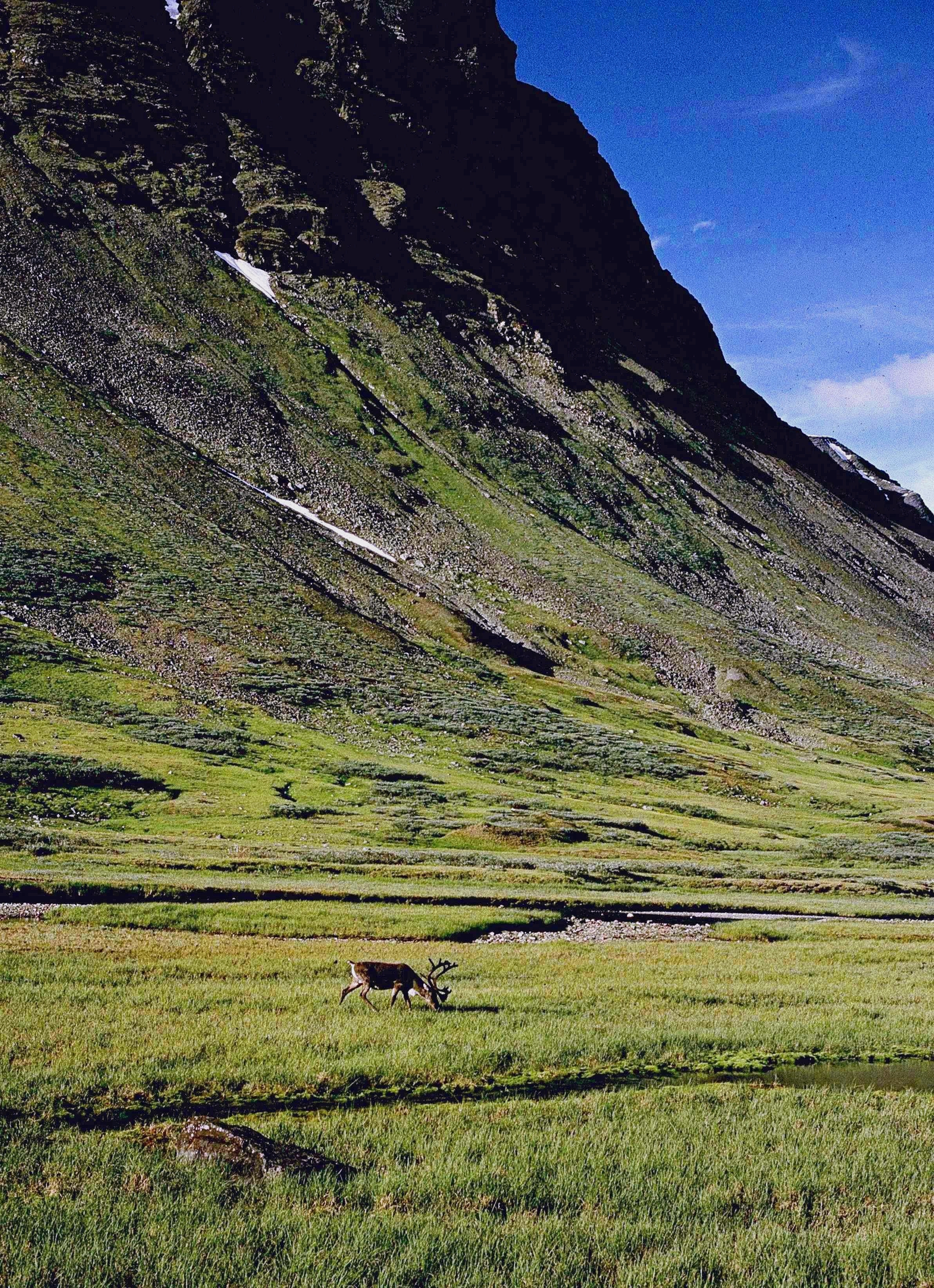 Ren i Alkavagge.